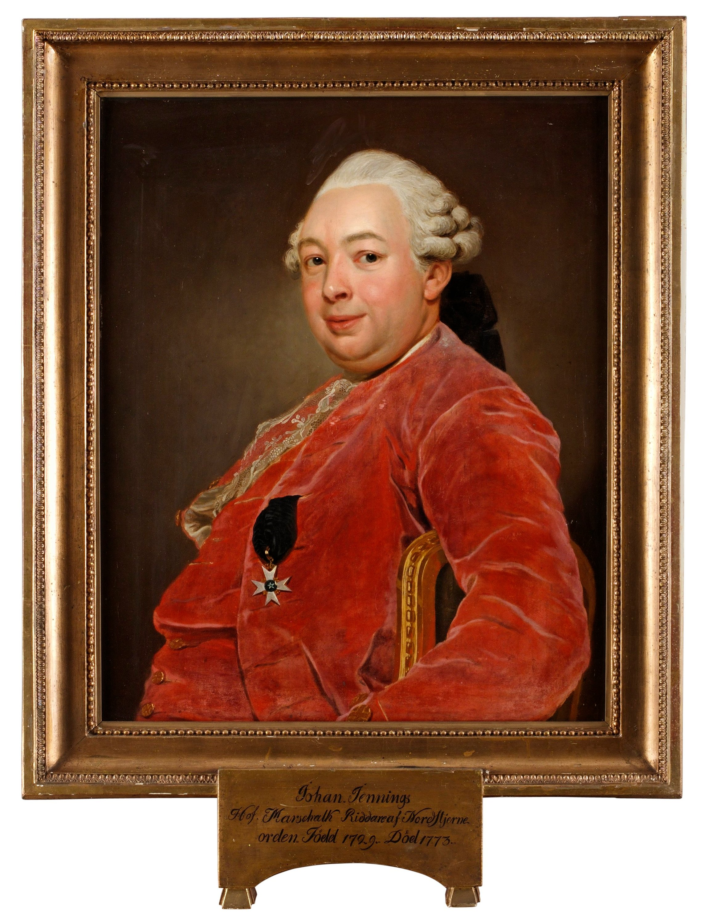 Porträtt föreställande John Jennings (1729-1773), avporträtterad av Alexander Roslin.